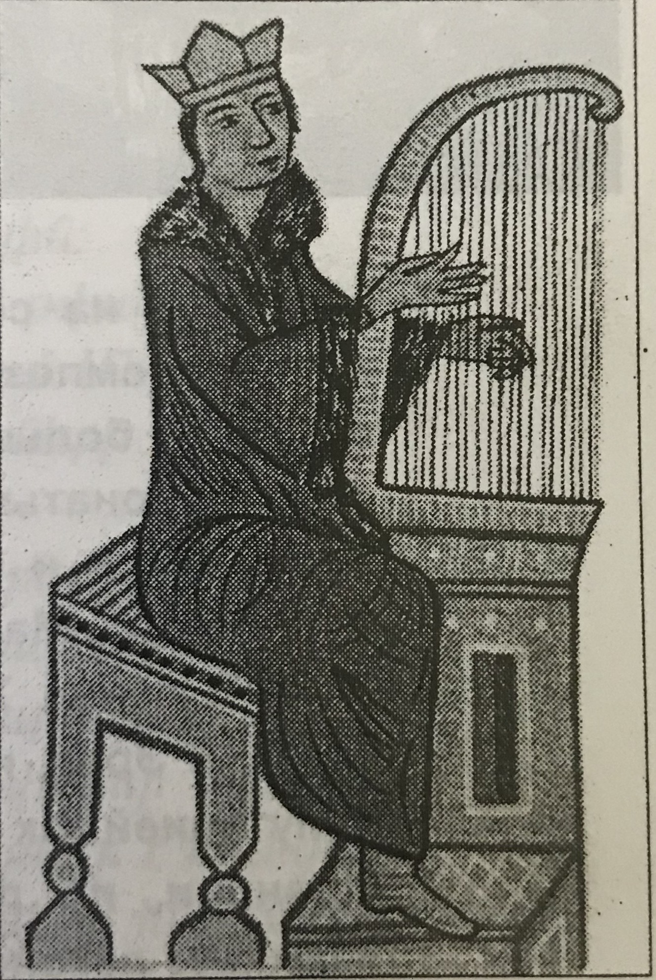 արքայական ծագում ունեցող տավղահար